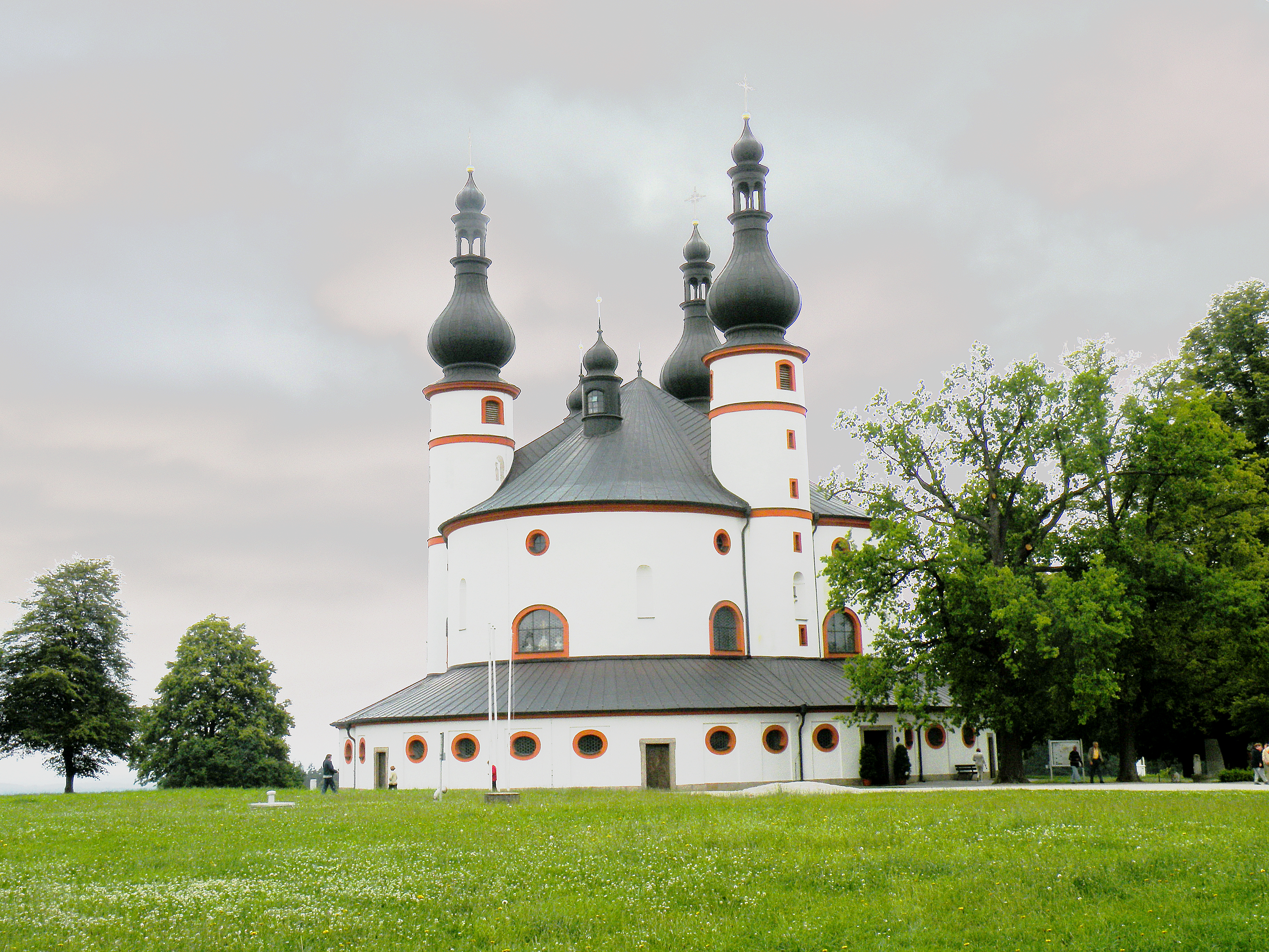 Каппель. Одно из наиболее знаменитых церковных круглых зданий в стиле барокко.